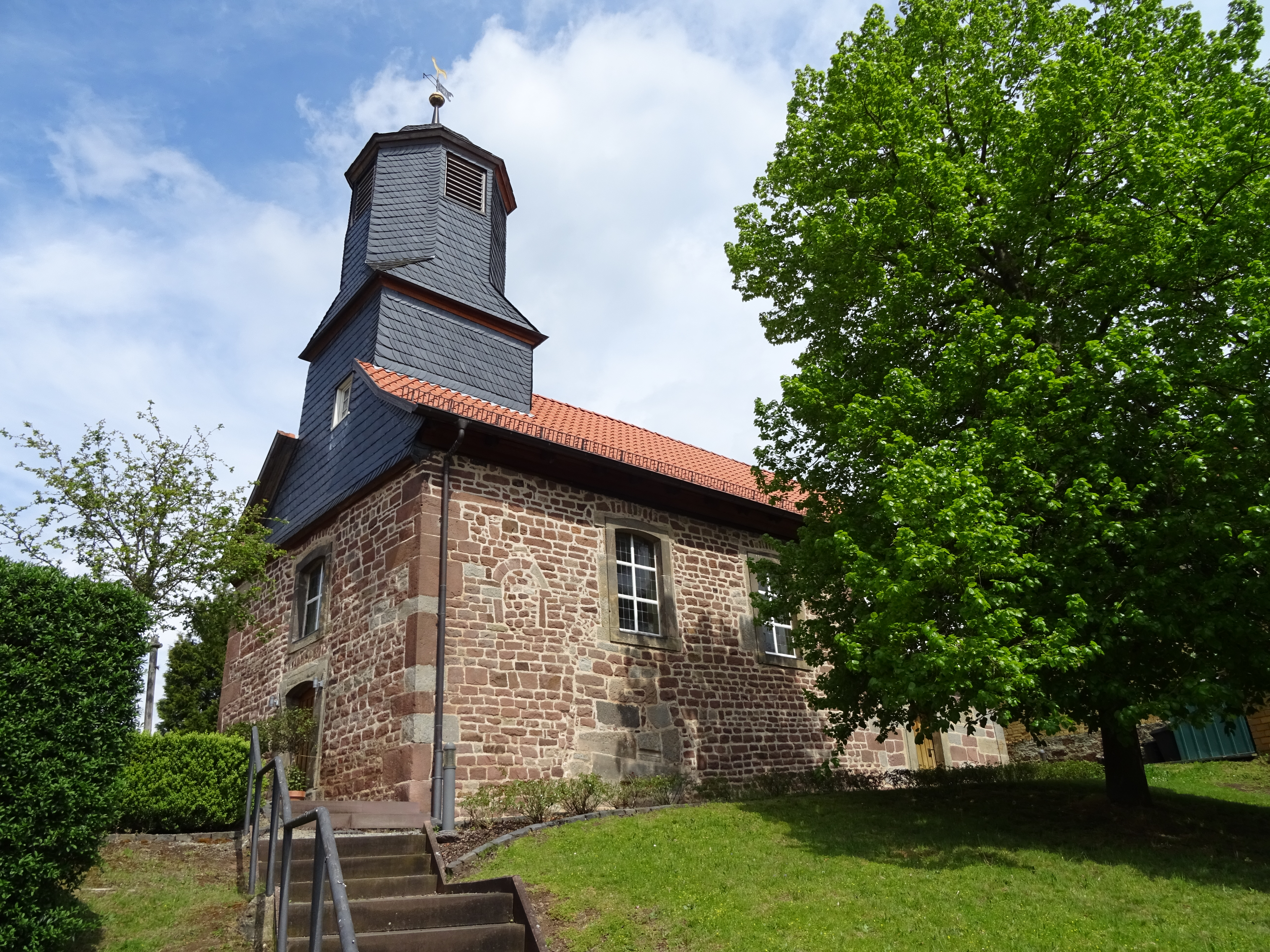 Ansicht von Südwest